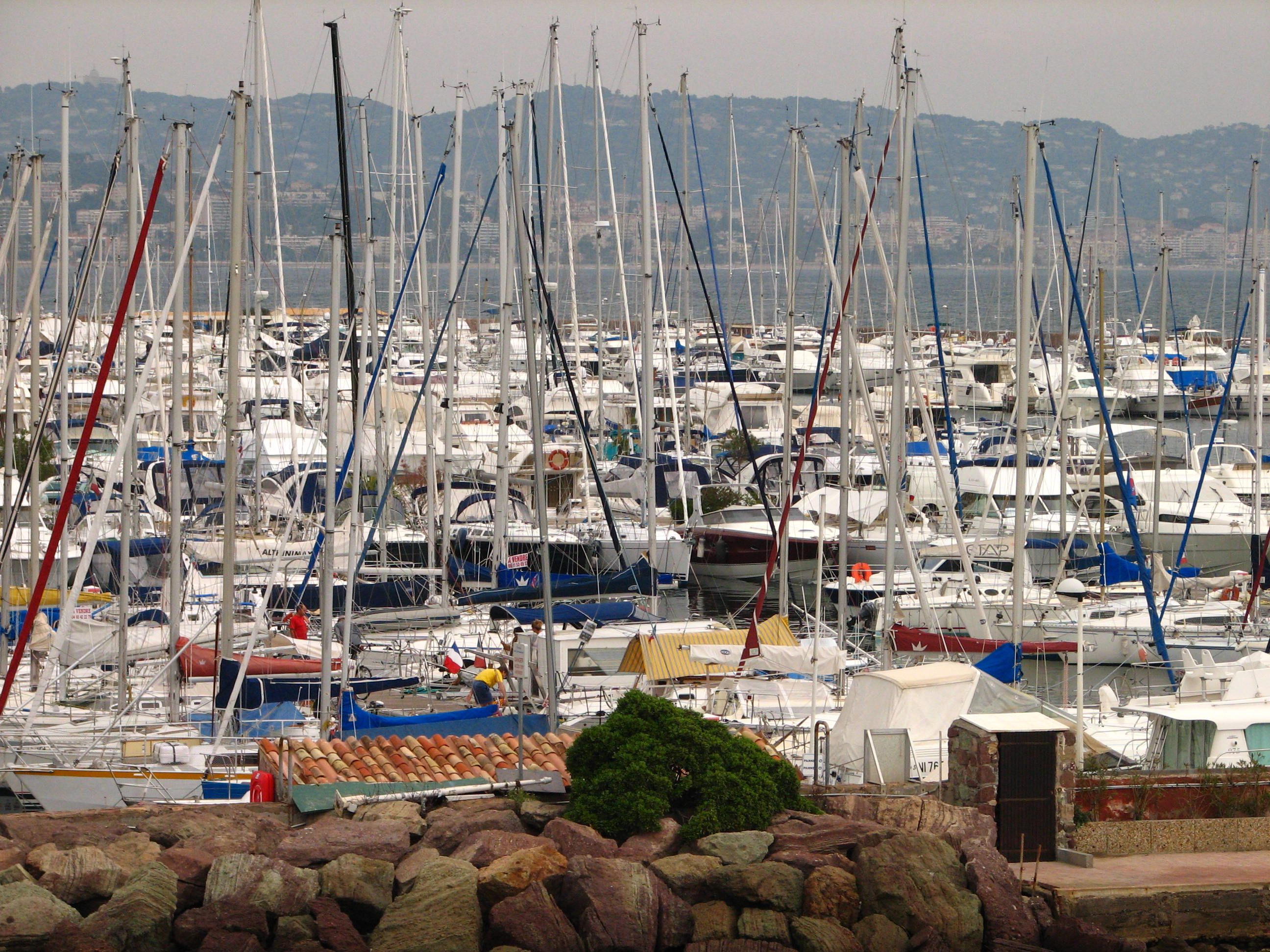 Napoule, jachty